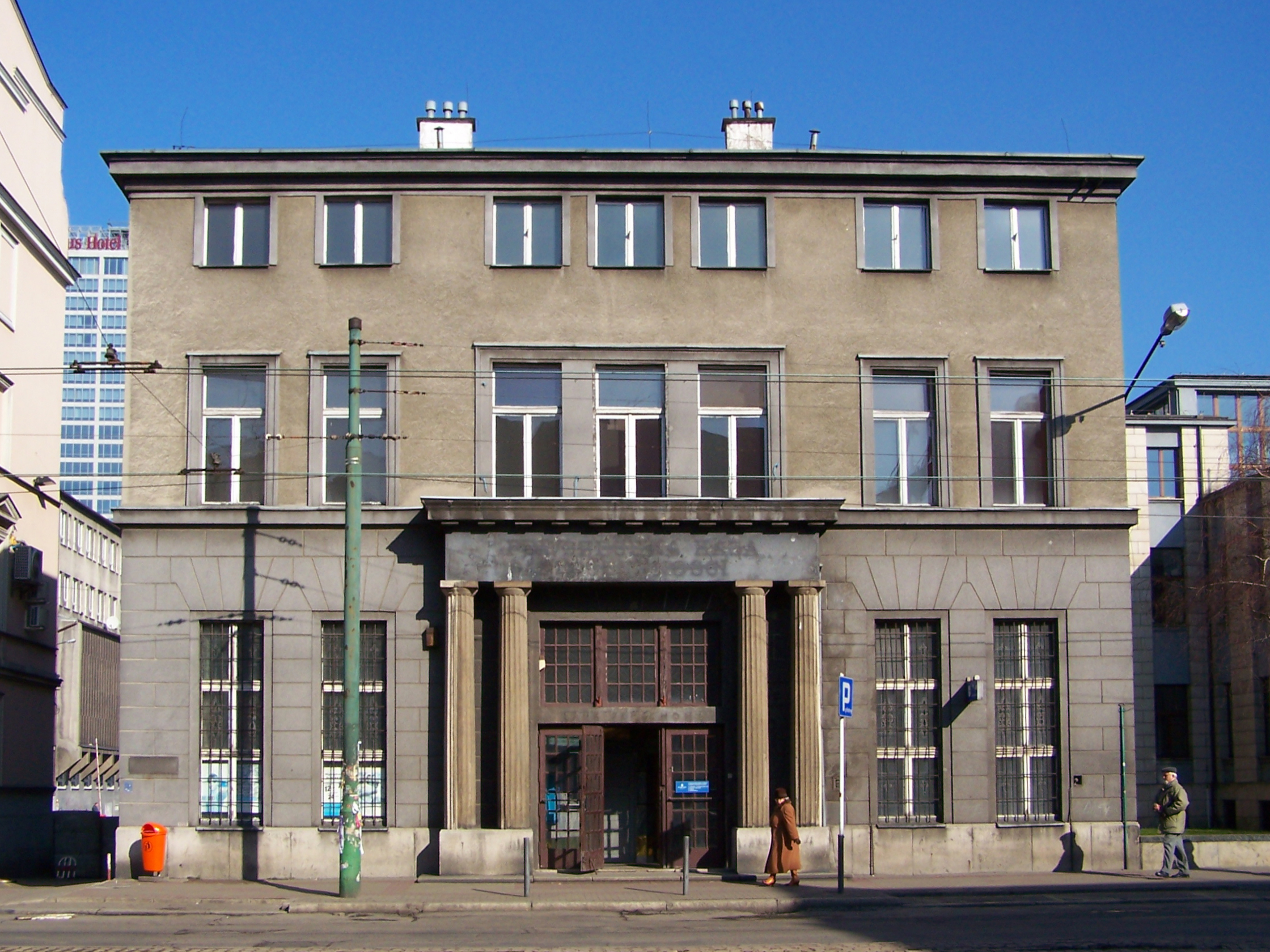 Siedziba banku PKO B.P. S.A. przy ul. Warszawskiej 12 w Katowicach.